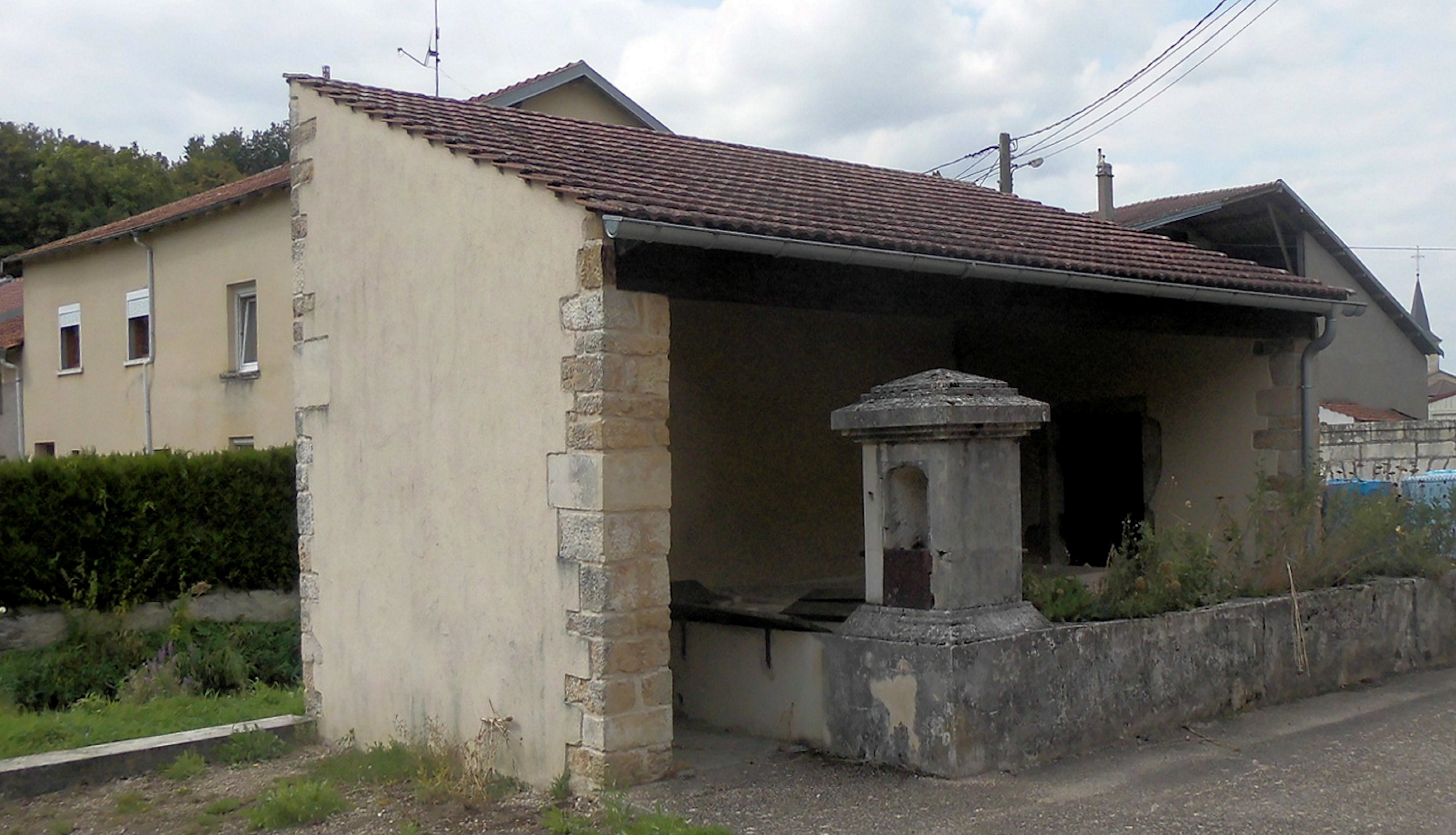 L'ancien javoir de Gémonville